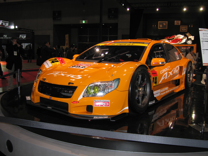 '09 SUPER GT参戦車両 オートサロンにて撮影